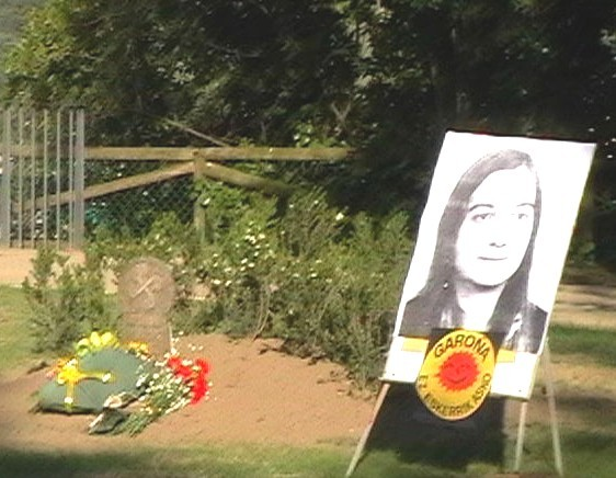 Homenaje a Gladys del Estal, muerta en una manifestación antinuclear.